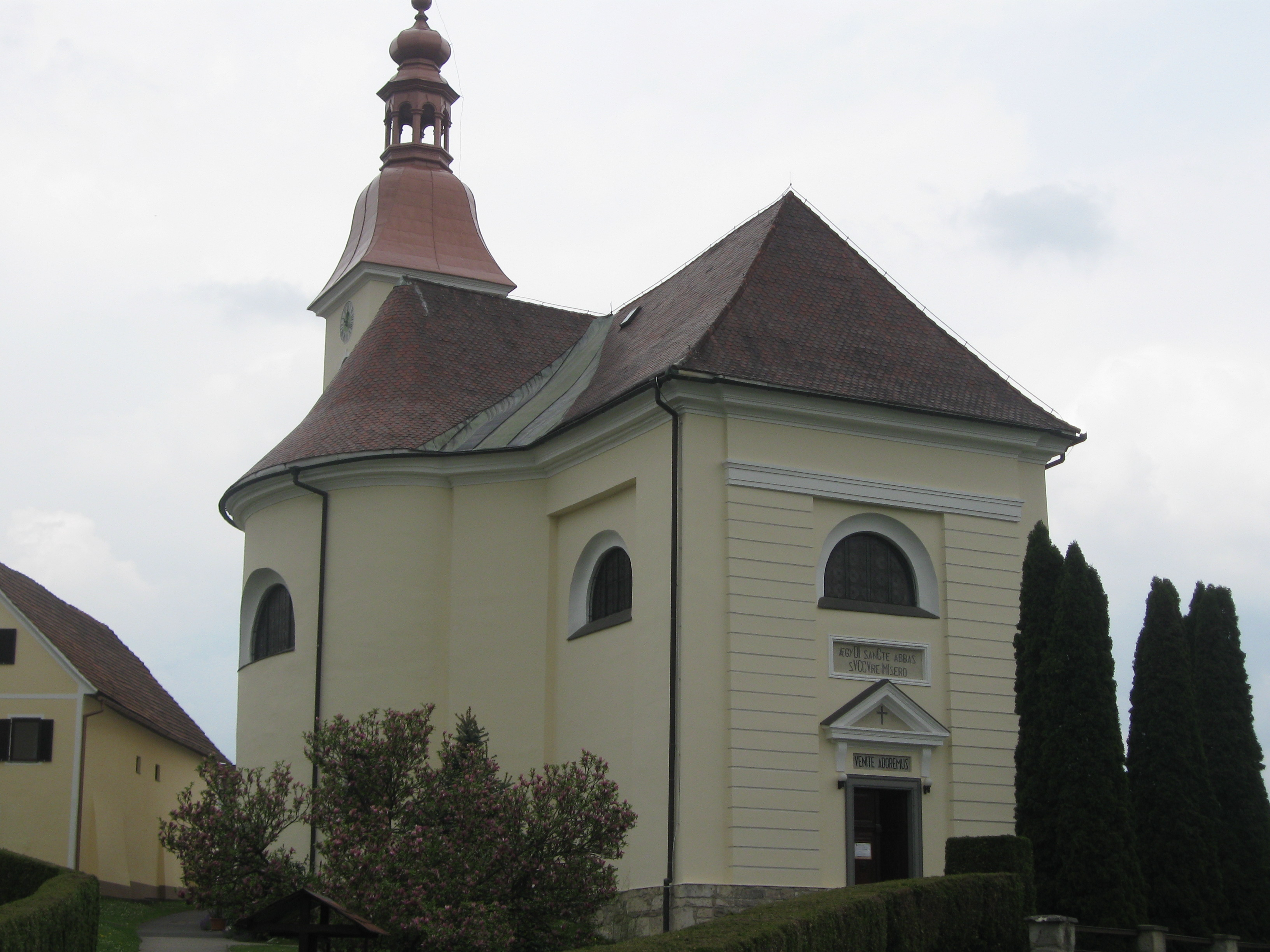 Cerkev Sv. Egidija v Šentilju iz začetka 14. stoletja.